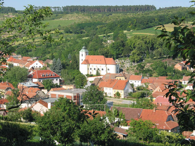 Pohled na centrum obce kde je kostel, kulturní dům i radnice